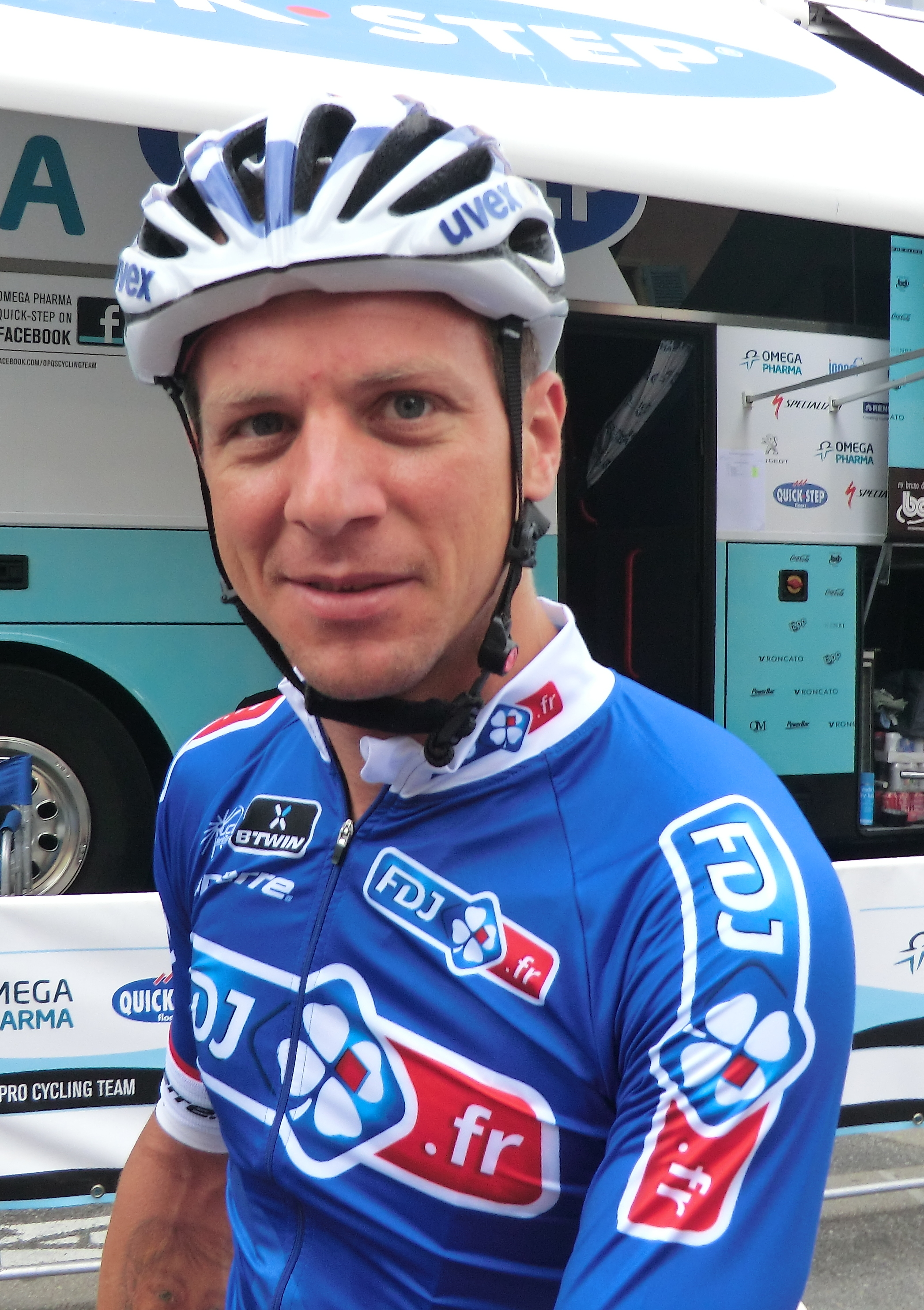 Photographié à Trévoux, au cours de l'après-midi précédent le départ du prologue (18 h) du Tour de l'Ain 2013.